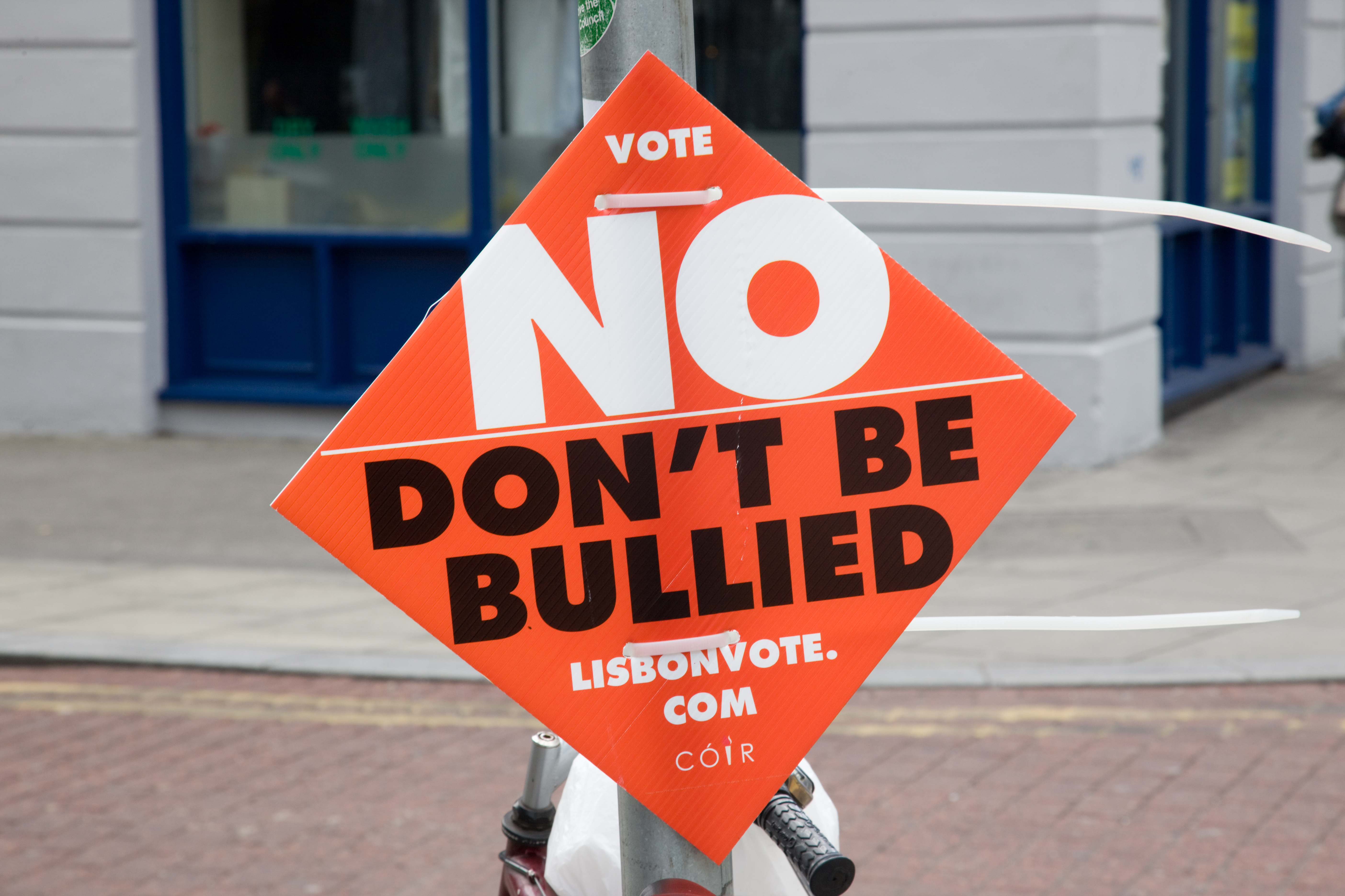 Plakat vor dem Referendum der Iren zum Vertrag von Lissabon, 12. Juni 2008